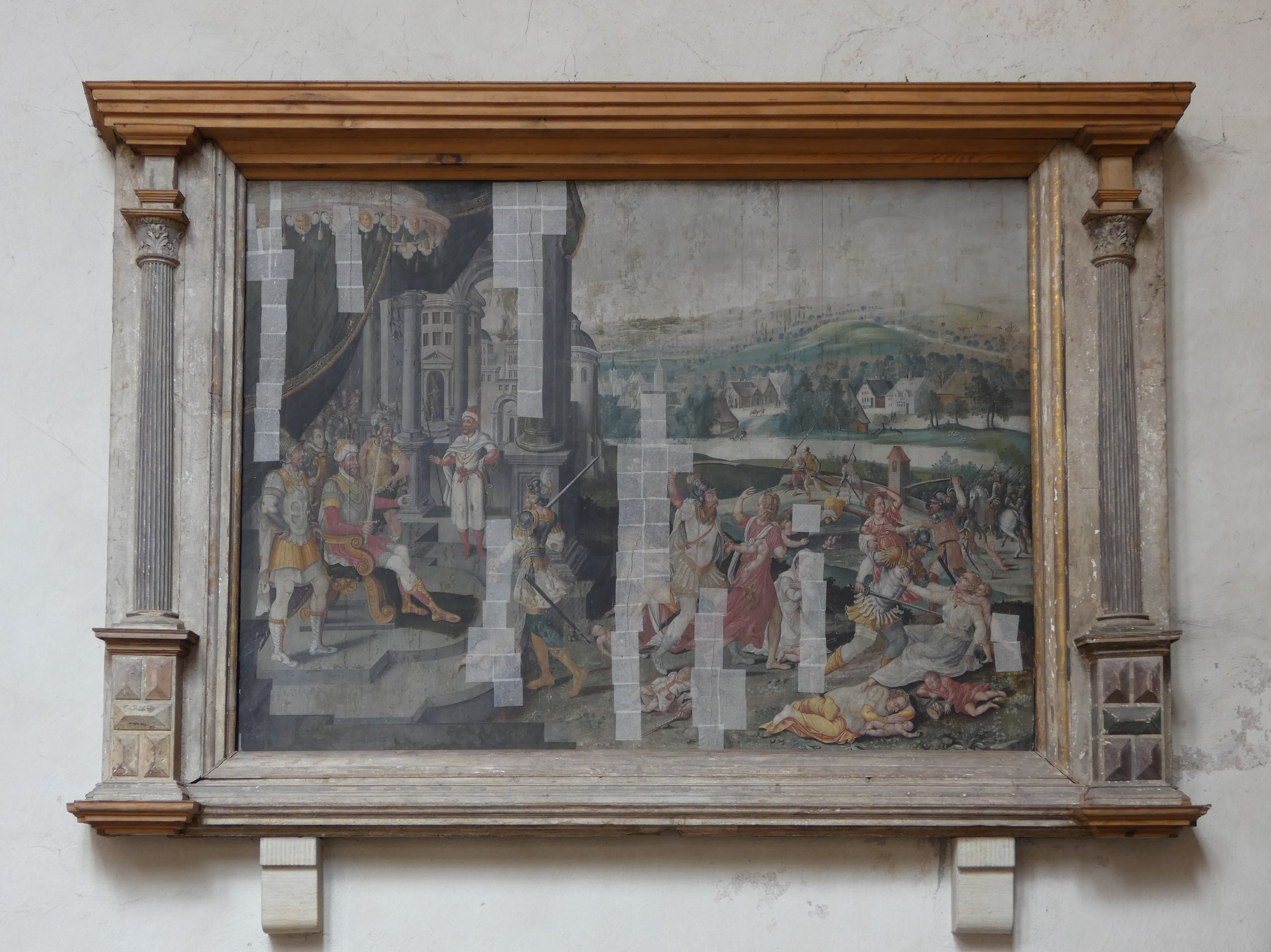 Kindermord in Bethlehem, Gemälde, St. Bartholomäi, Zerbst/Anhalt